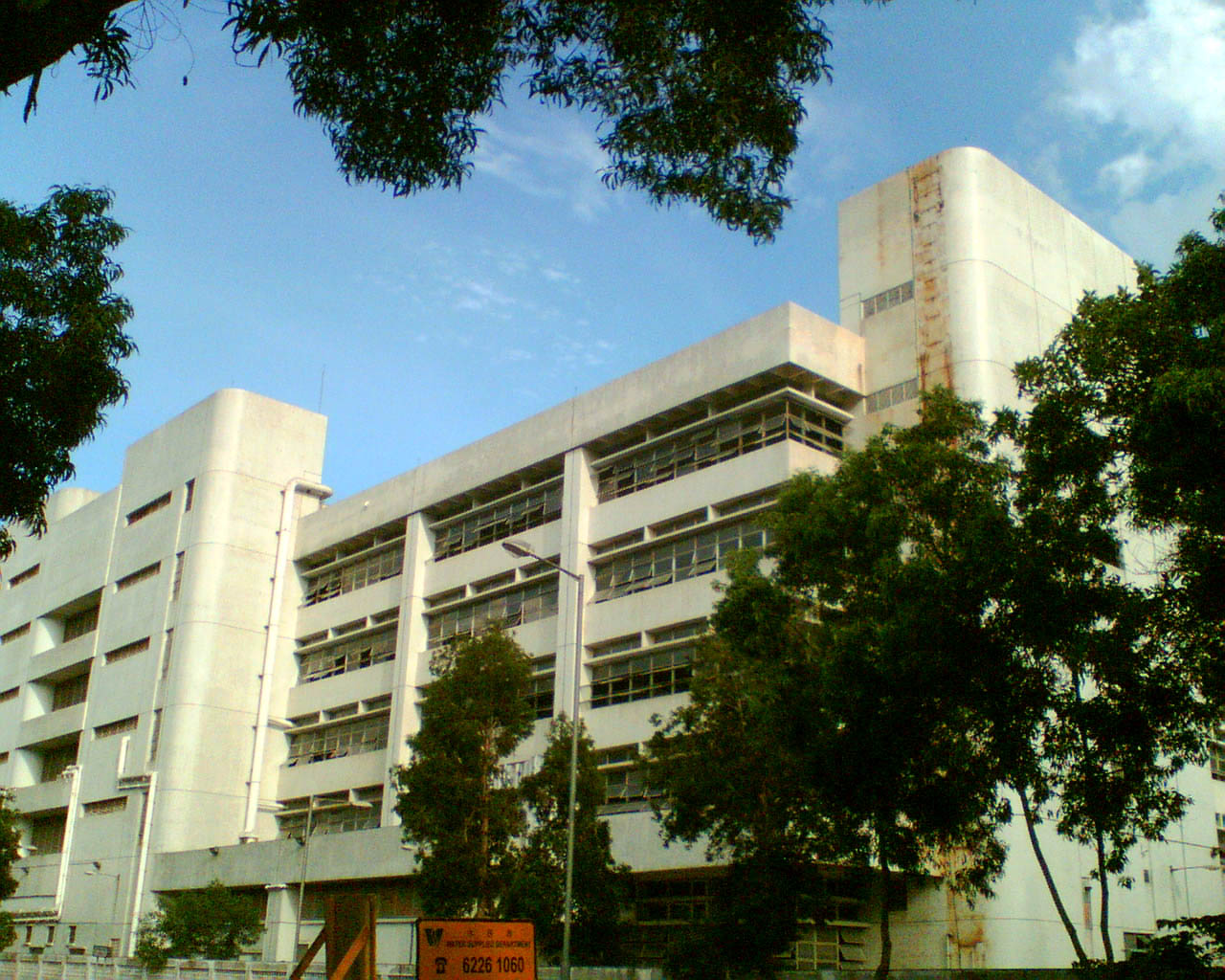 亞洲電視正在裝修位於大埔的新總部